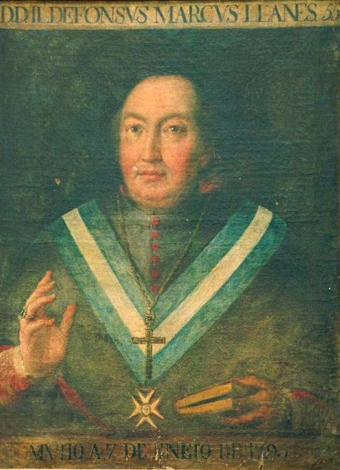 El prelado aparece vestido de eclesiástico y con manteo y luce sobre su pecho una cruz pectoral y la gran cruz de la Orden de Carlos III.